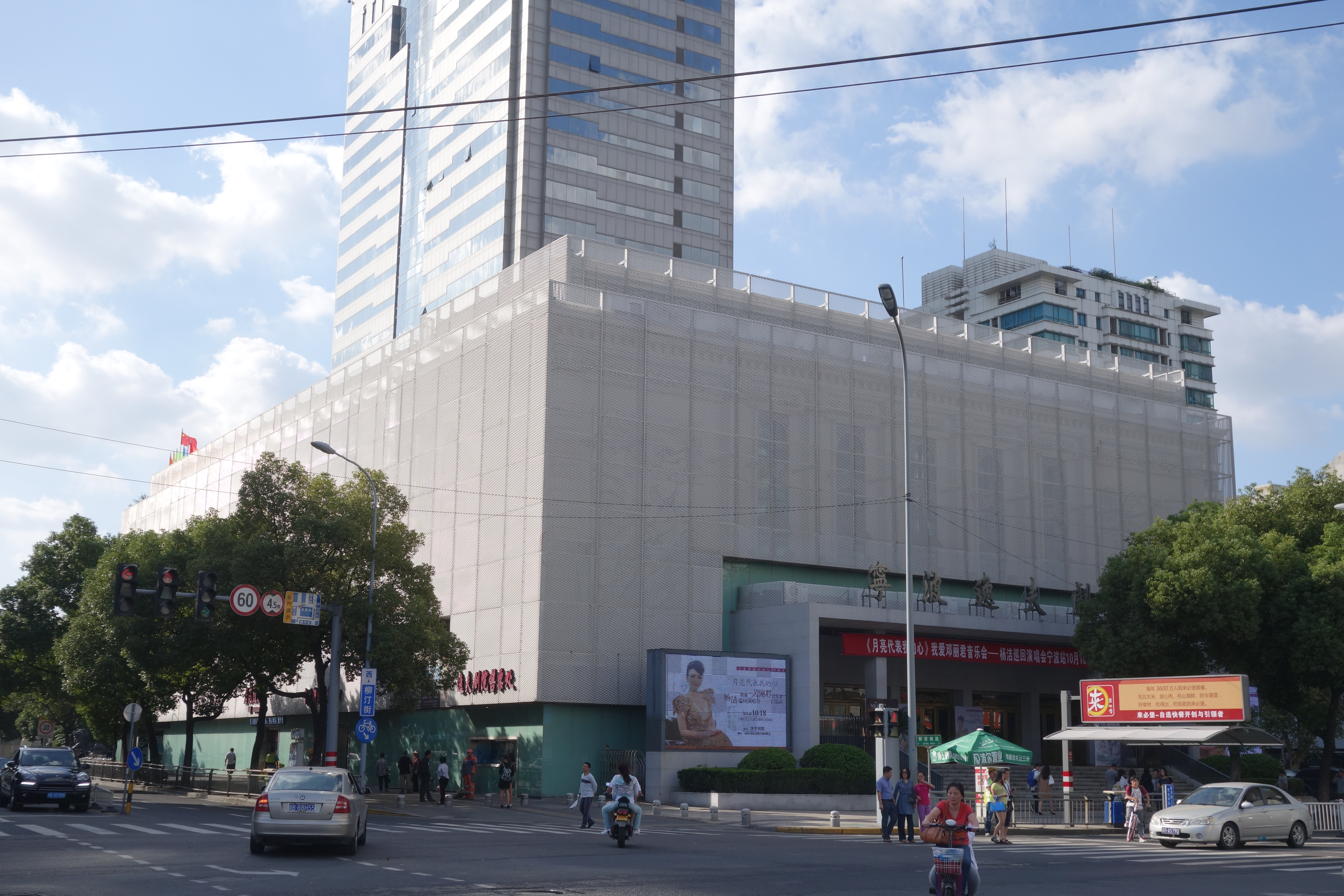 宁波逸夫剧院